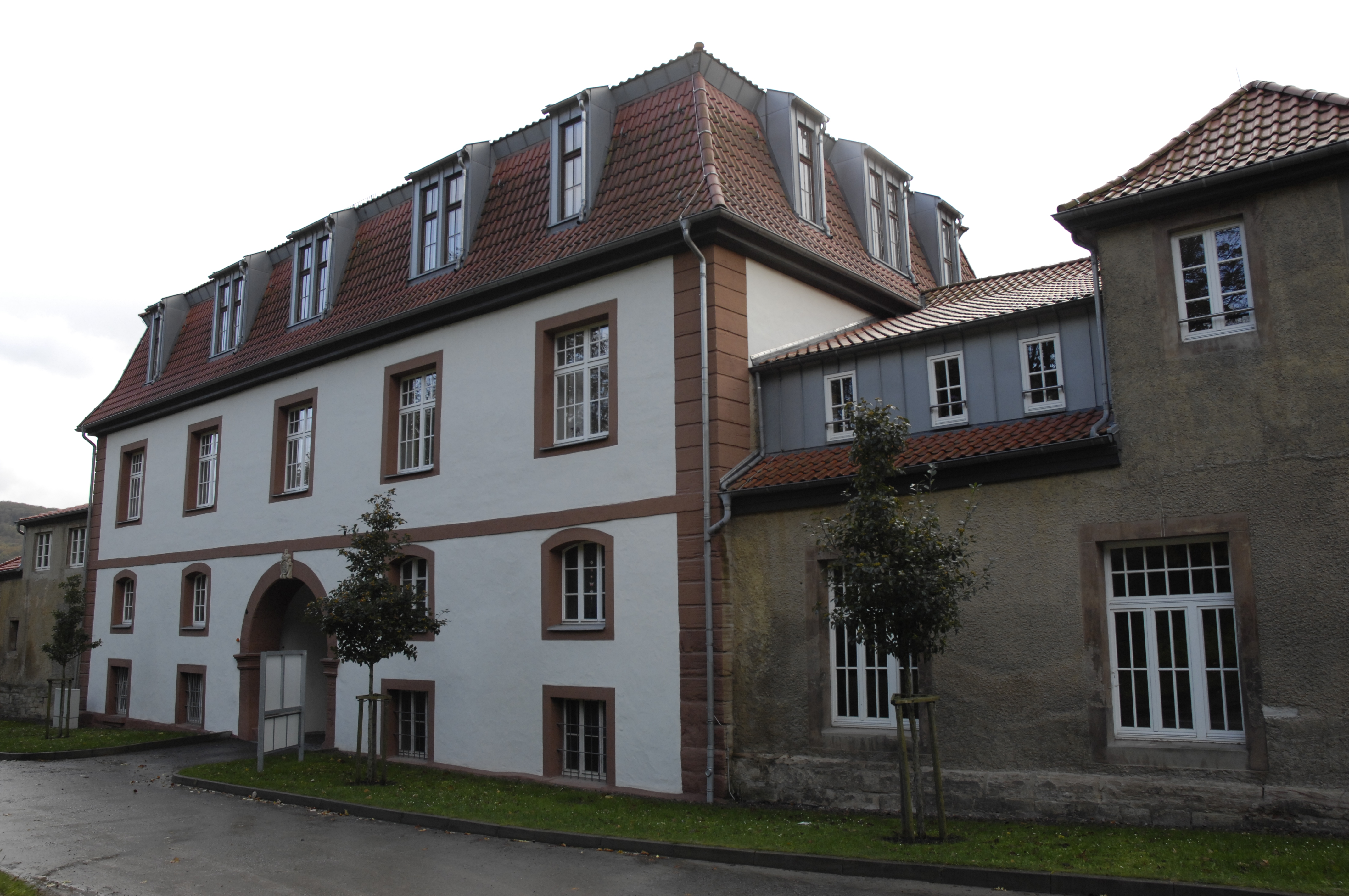 Schloss Bischofstein im Eichsfeld, Lengenfeld unterm Stein, Thüringen